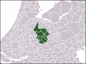 BRU-gemeenten (met behulp van Mtcv's kaart). Bestuur Regio Utrecht, afgekort BRU, is een plusregio in de provincie Utrecht. Het BRU omvat 9 gemeenten. Tot 1 januari 2004 telde het BRU-gebied 23 gemeenten. De 13 afgescheiden gemeenten zijn: Abcoude, Amerongen, Breukelen, Driebergen-Rijsenburg, De Ronde Venen, Doorn, Leersum, Loenen, Lopik, Maarn, Montfoort, Oudewater, Wijk bij Duurstede en Woerden. Sinds 1 januari 2006 vertegenwoordigt het BRU 9 gemeenten. De negen gemeenten zijn: Bunnik, De Bilt, Houten, Nieuwegein, Stichtse Vecht, Utrecht, Vianen, IJsselstein en Zeist. Het BRU is qua gemeenten vrijwel gelijk aan de agglomeratie Utrecht.